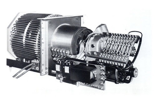 GEのコミューテーターコントローラー